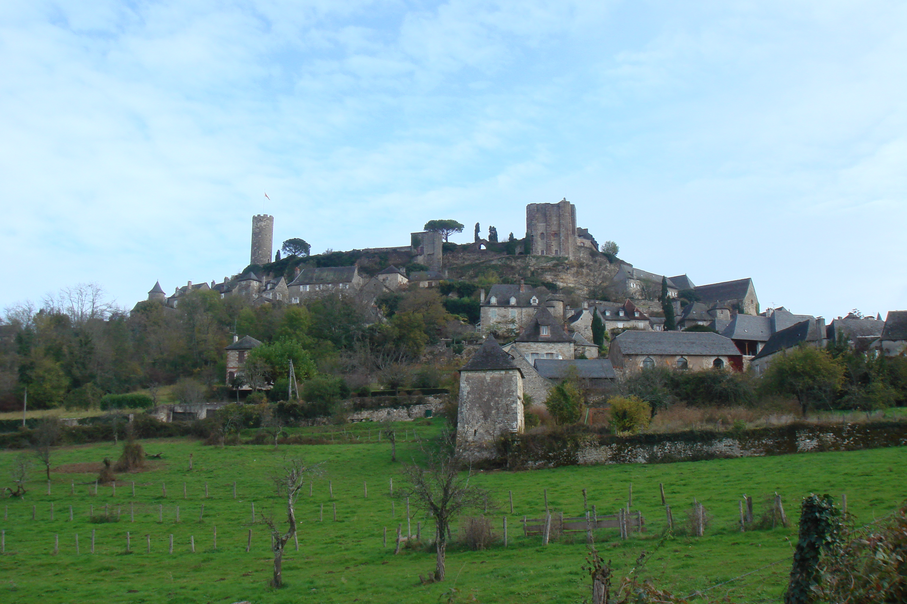 turenne